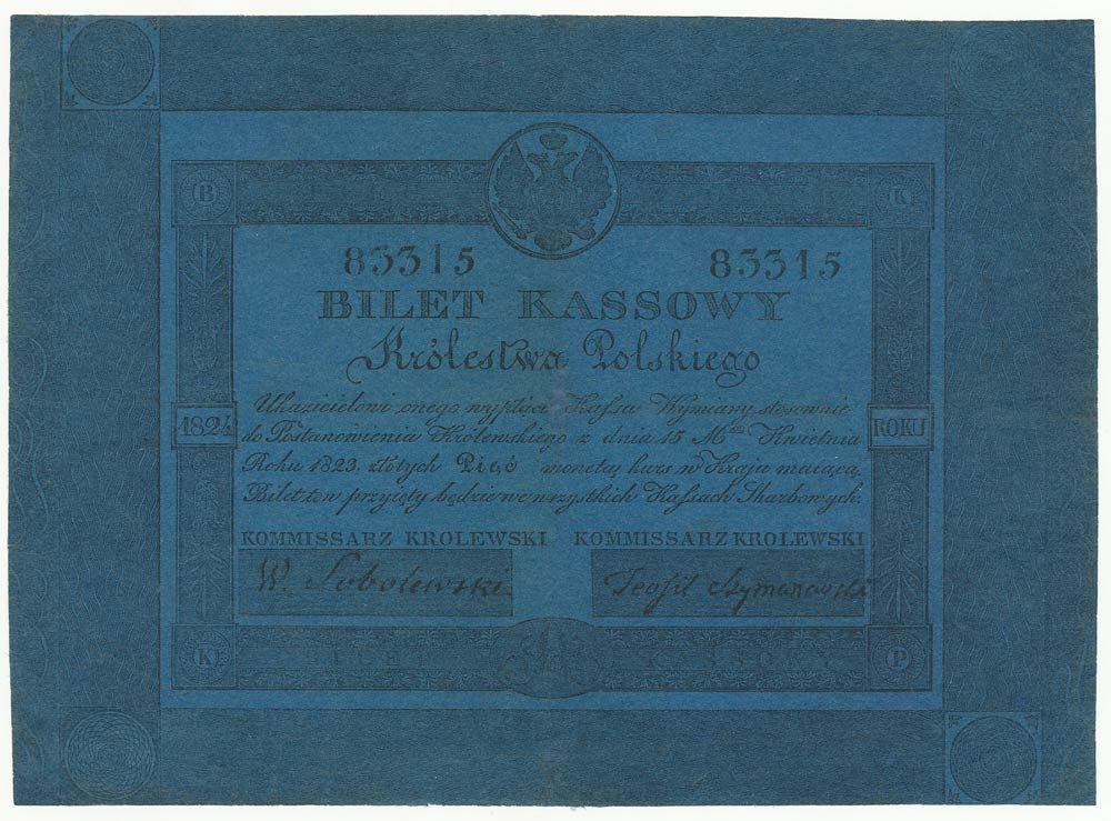 5 złotych polskich 1824 awers